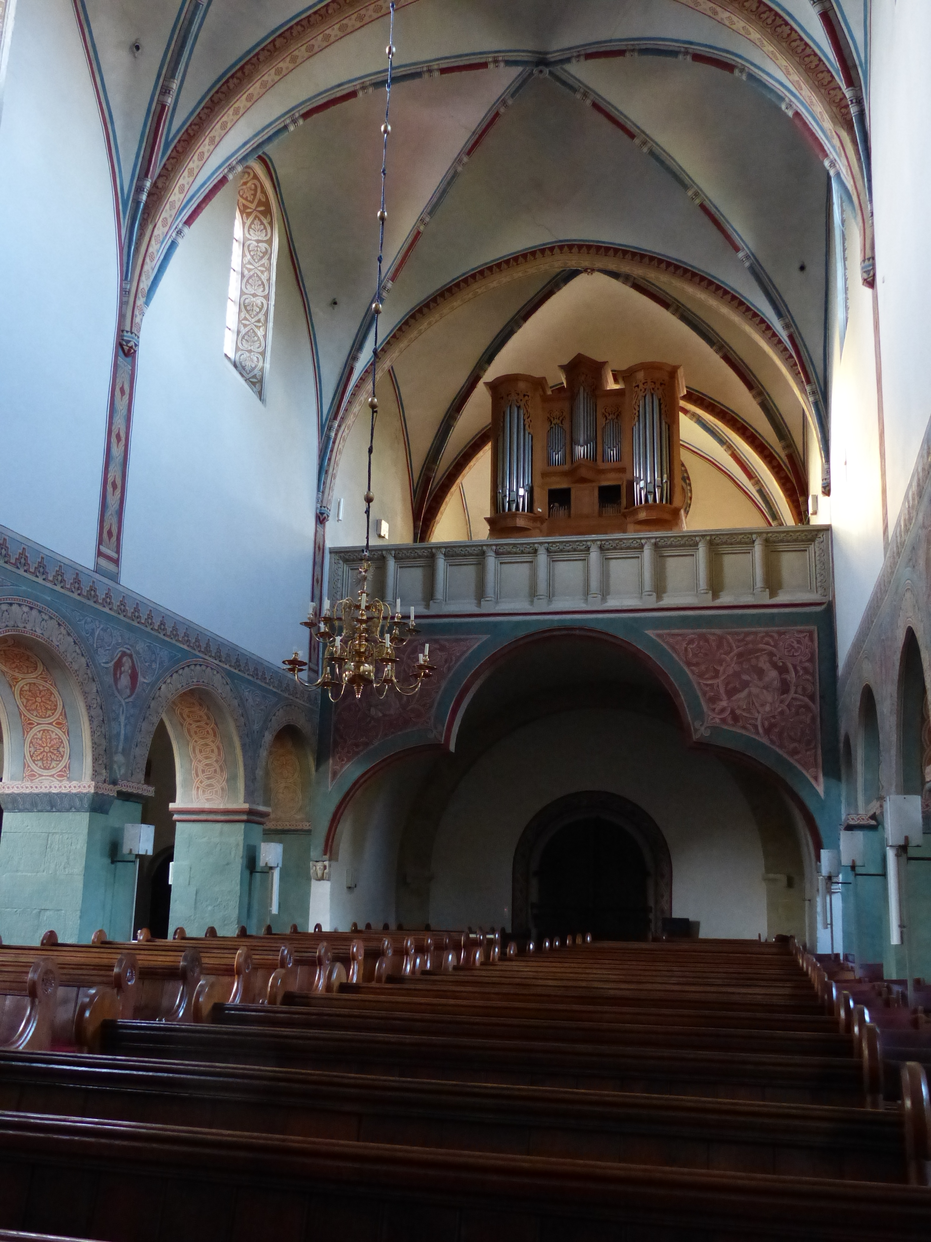 Stiftskirche in Bücken on Weser river